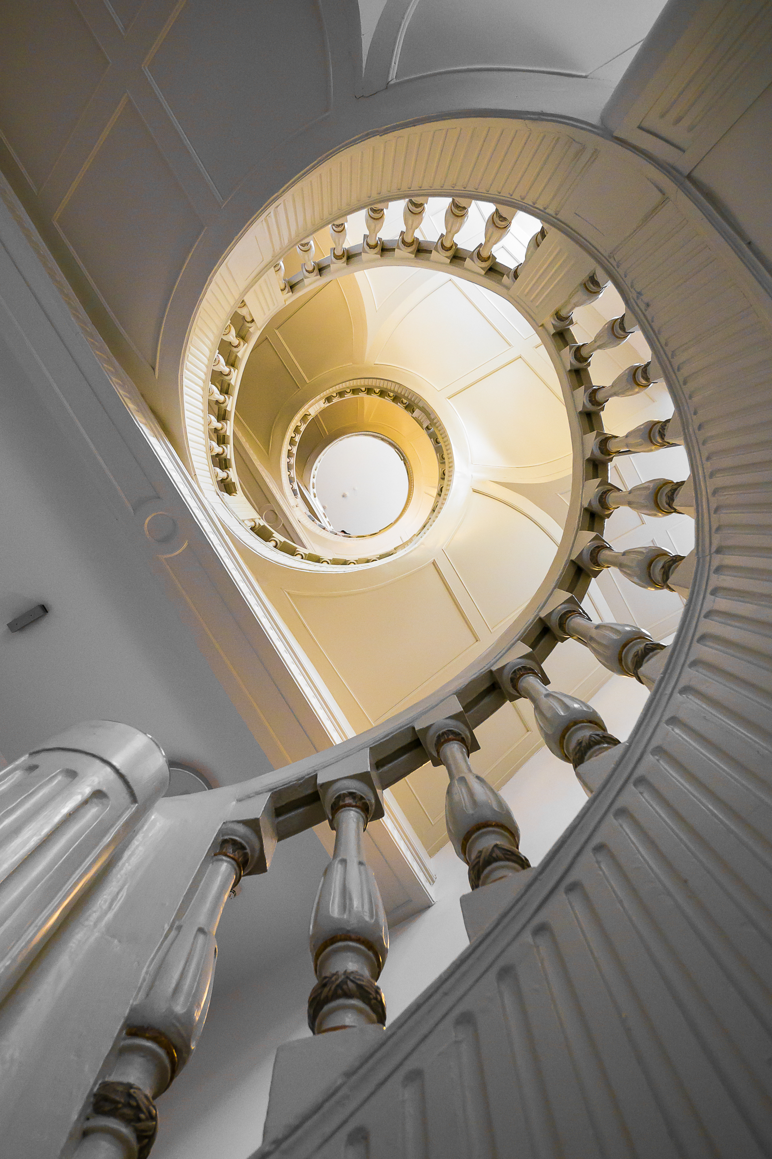 Das Treppenhaus im hinteren Teil des Palais Bellevue in Kassel, während der documenta 14.